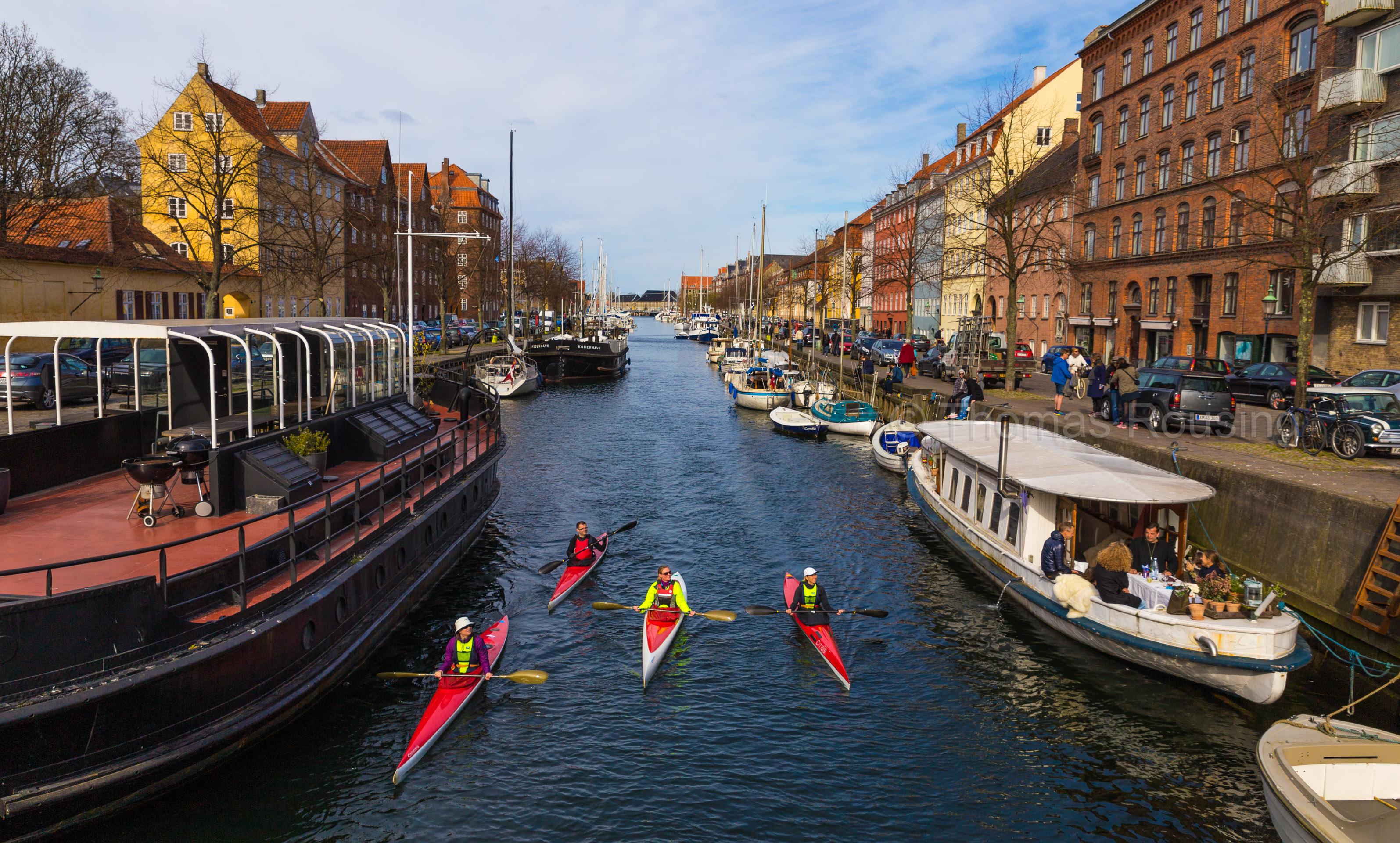 Christianshavns Kanal in Copenhagen, Denmark